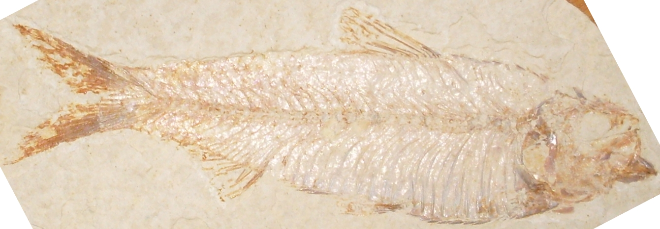 fossil of Knightia